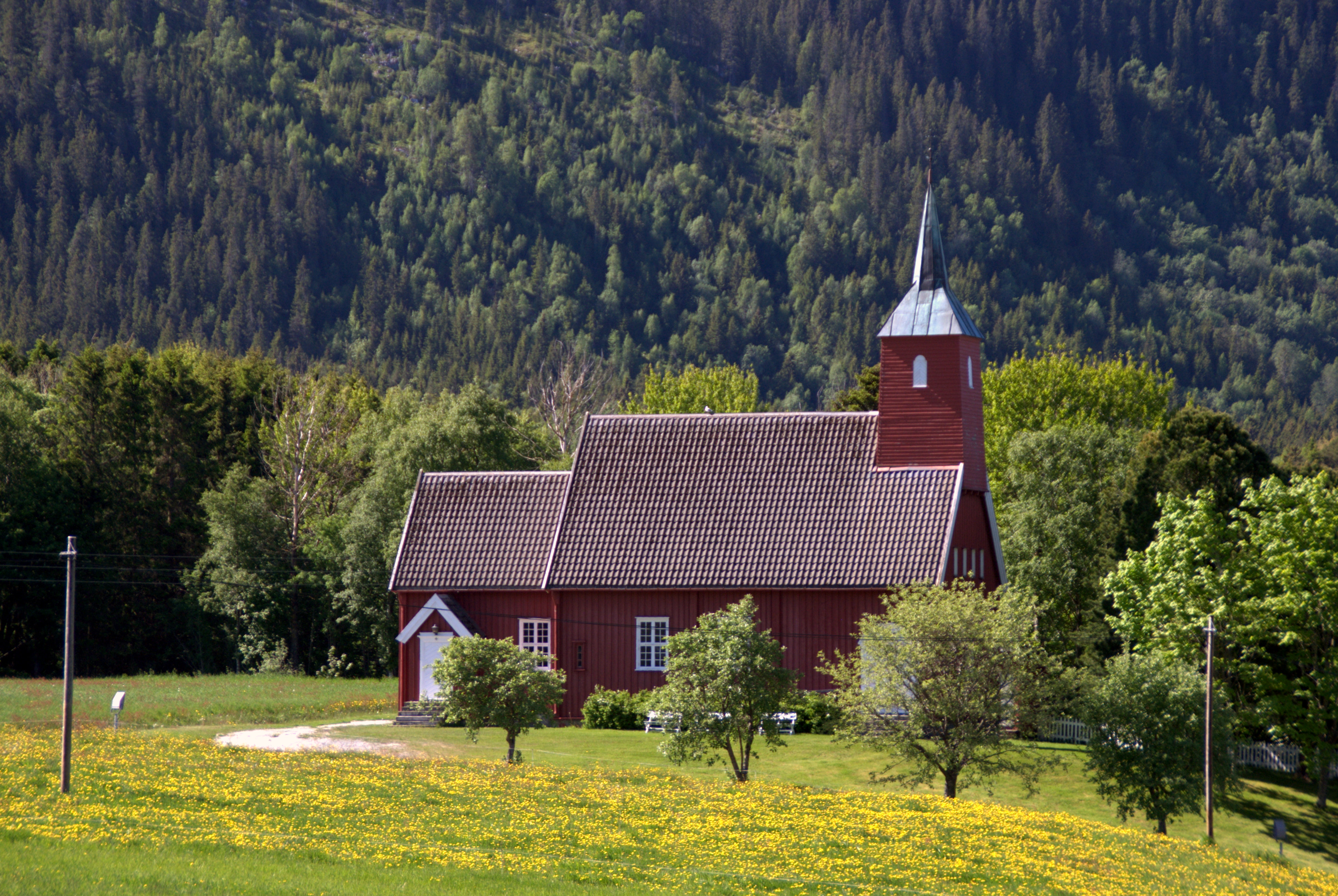 Ingdalen kirke i Agdenes i Sør-Trøndelag.